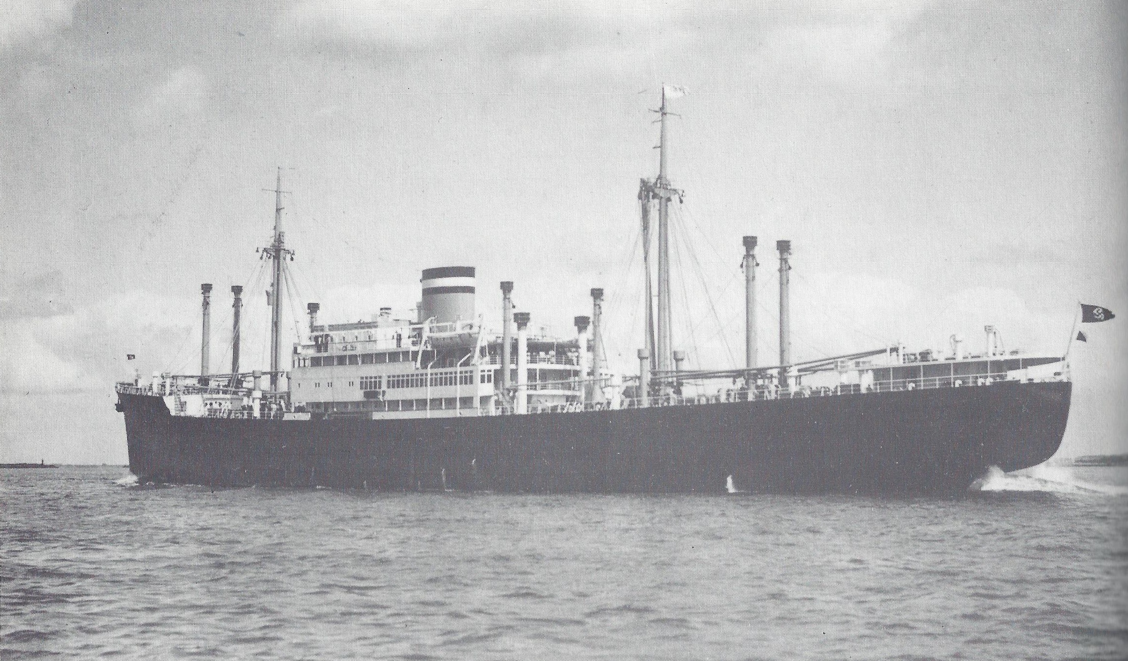 Kombischiff Huascaran.